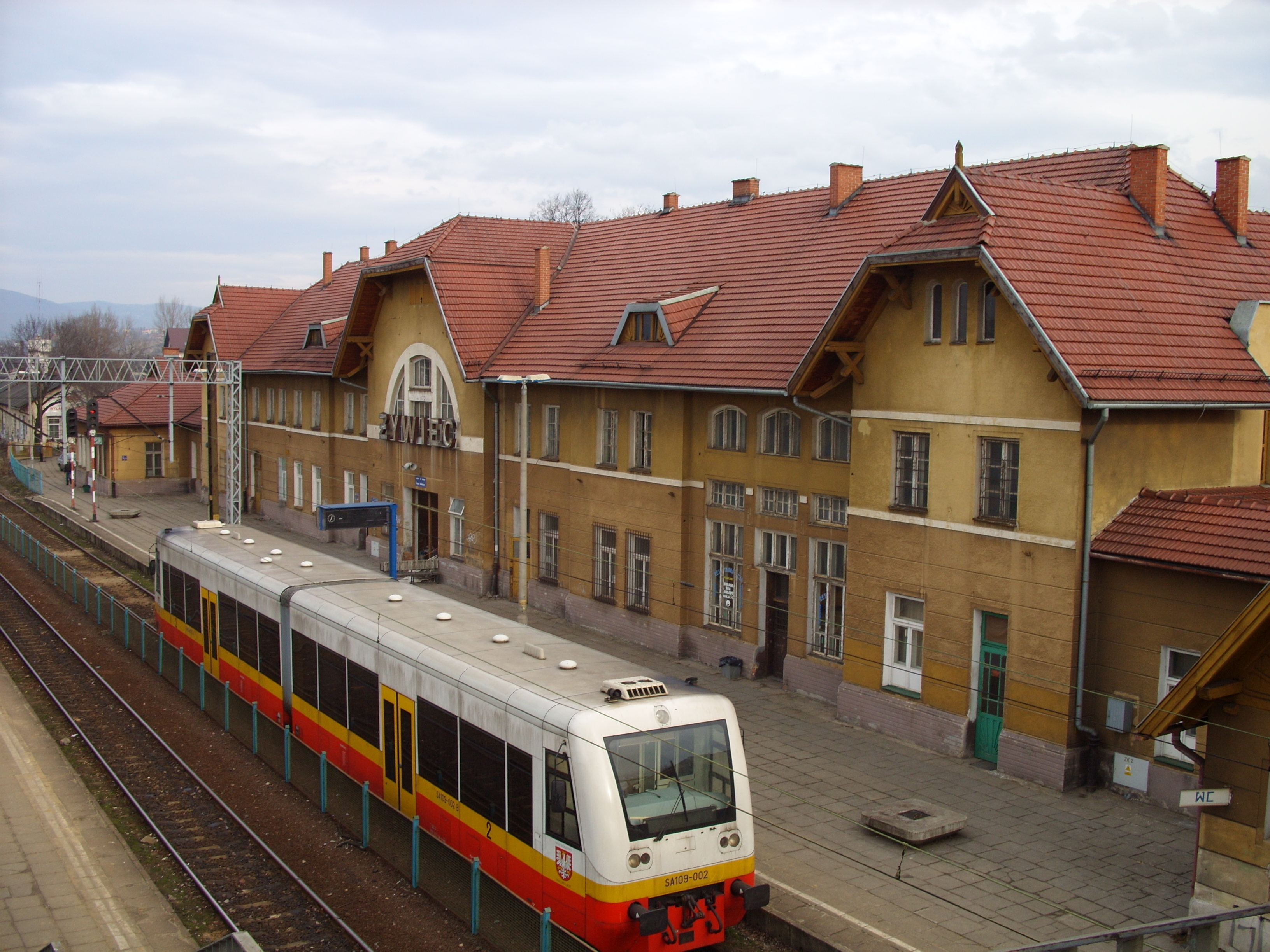 Železniční stanice v Żywci